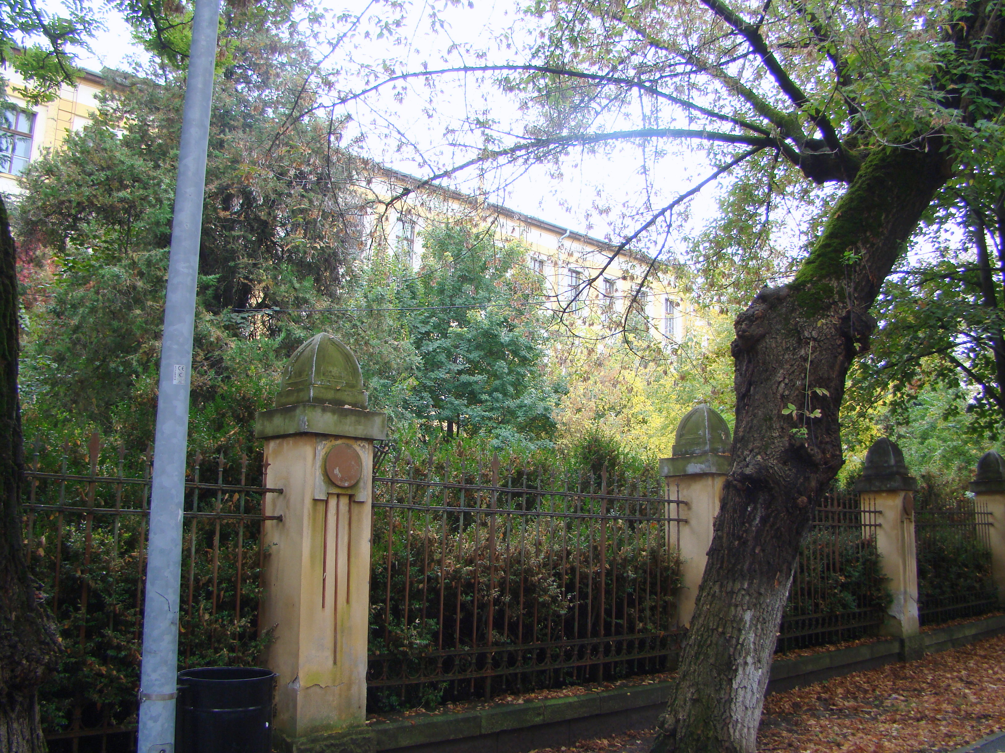 Ansamblul „Fabrica de Tutun”, municipiul Sfântu Gheorghe, str. Kós Károly 21-25 1902 - 1910